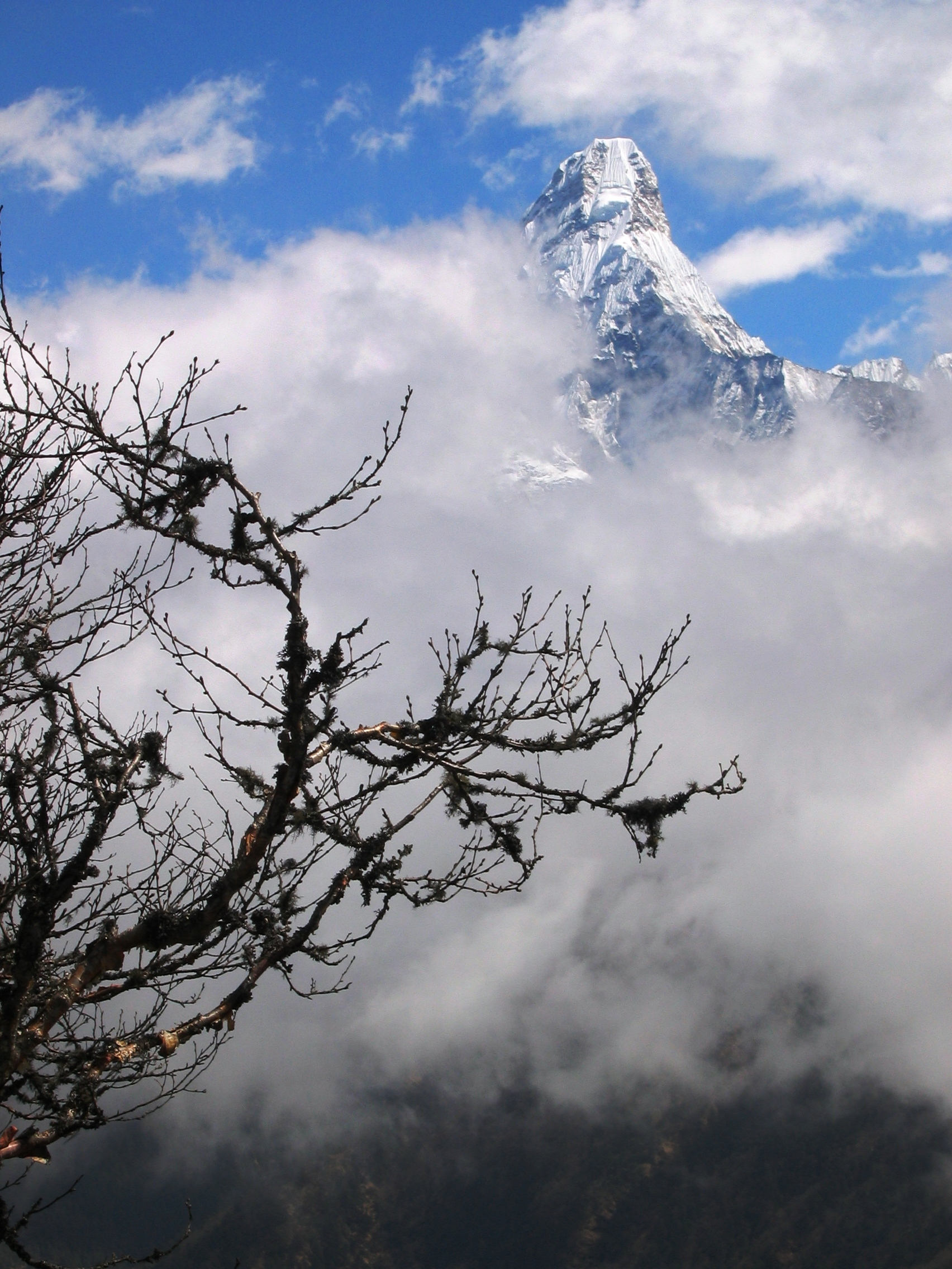 Ama Dablam